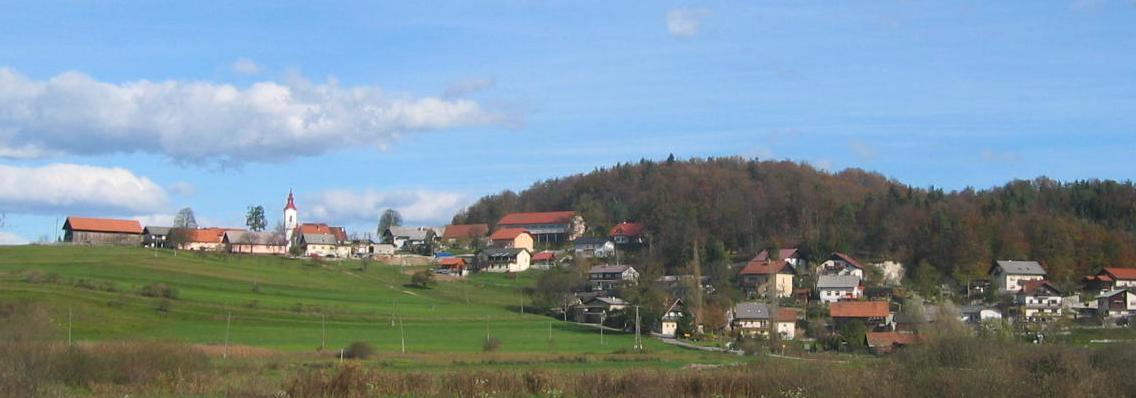 Gumnišče, village near Ljubljana, Slovenia photo:Ziga 18:32, 1 March 2007 (UTC)